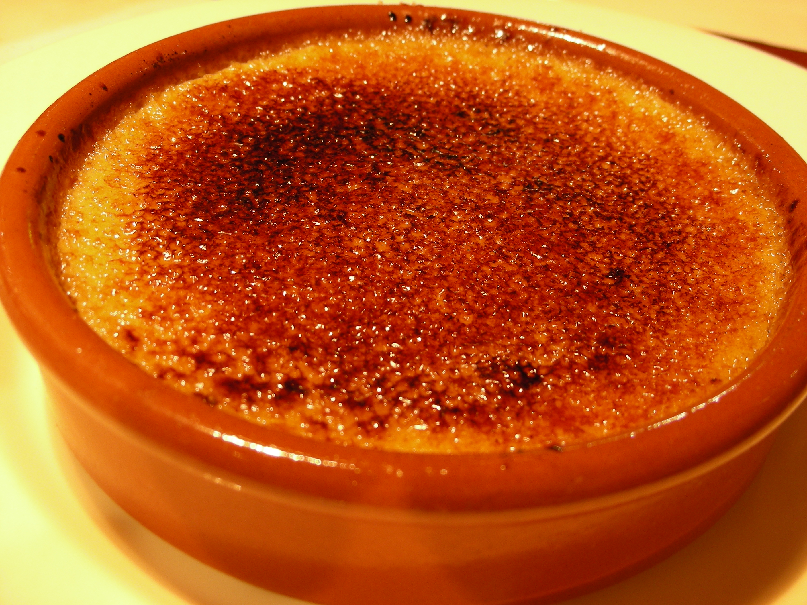 Crema quemada servida en Lyon (Francia). See post in My blog at Link